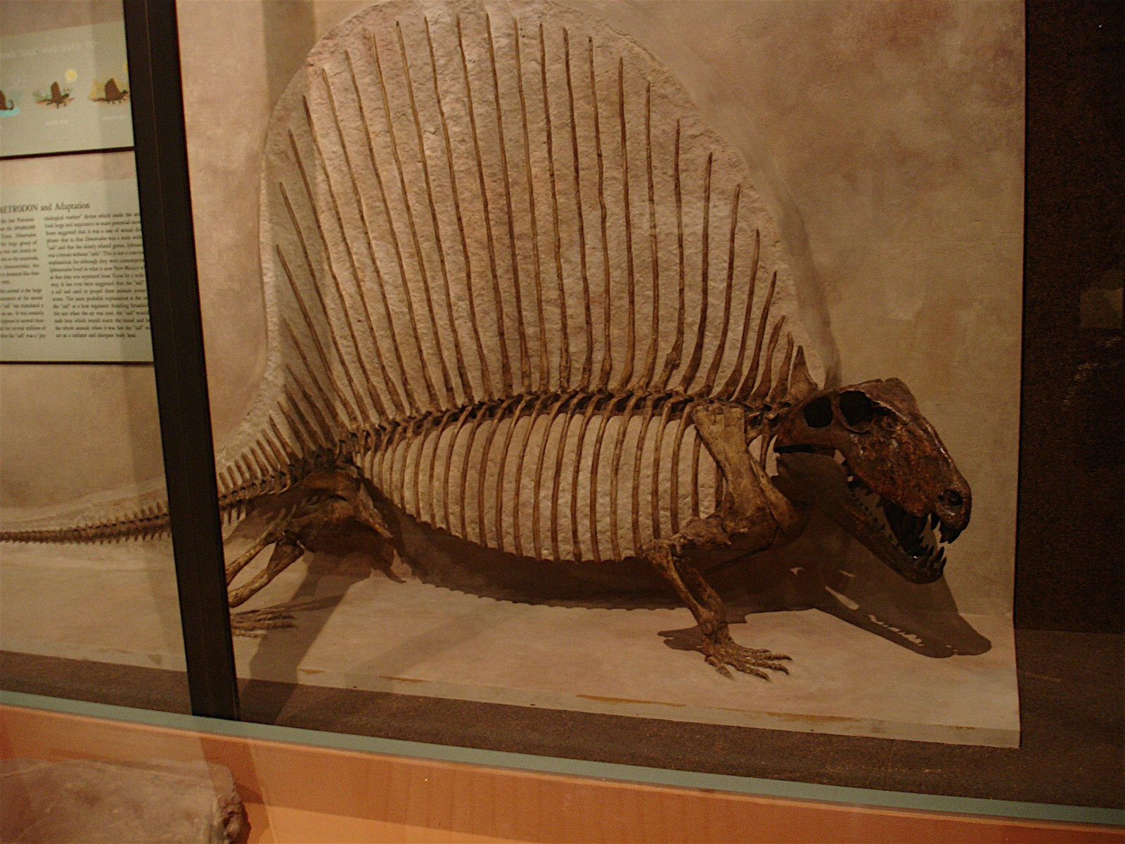 Dimetrodon